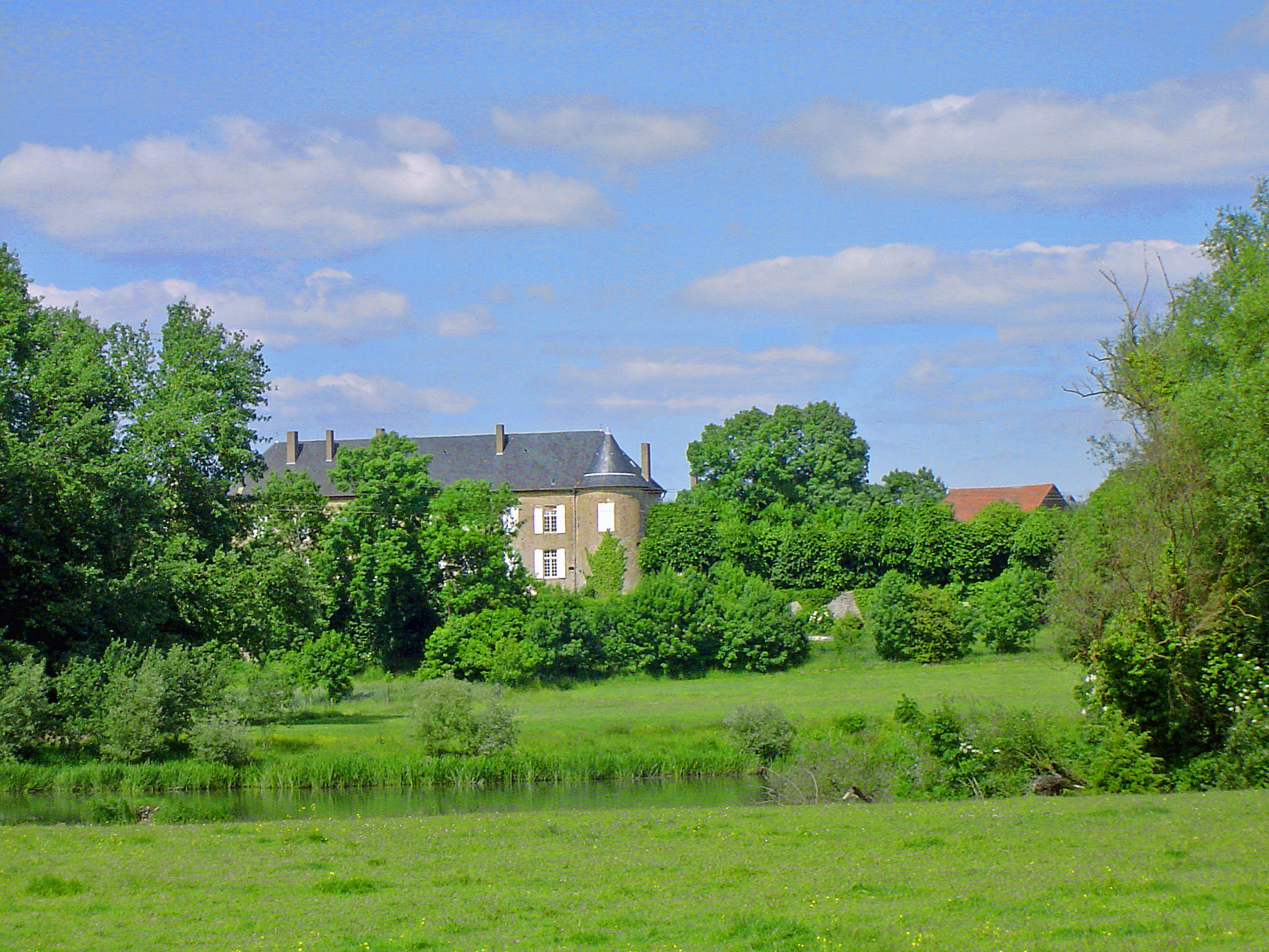 Le Château de Blettange, annexe de la commune de Bousse